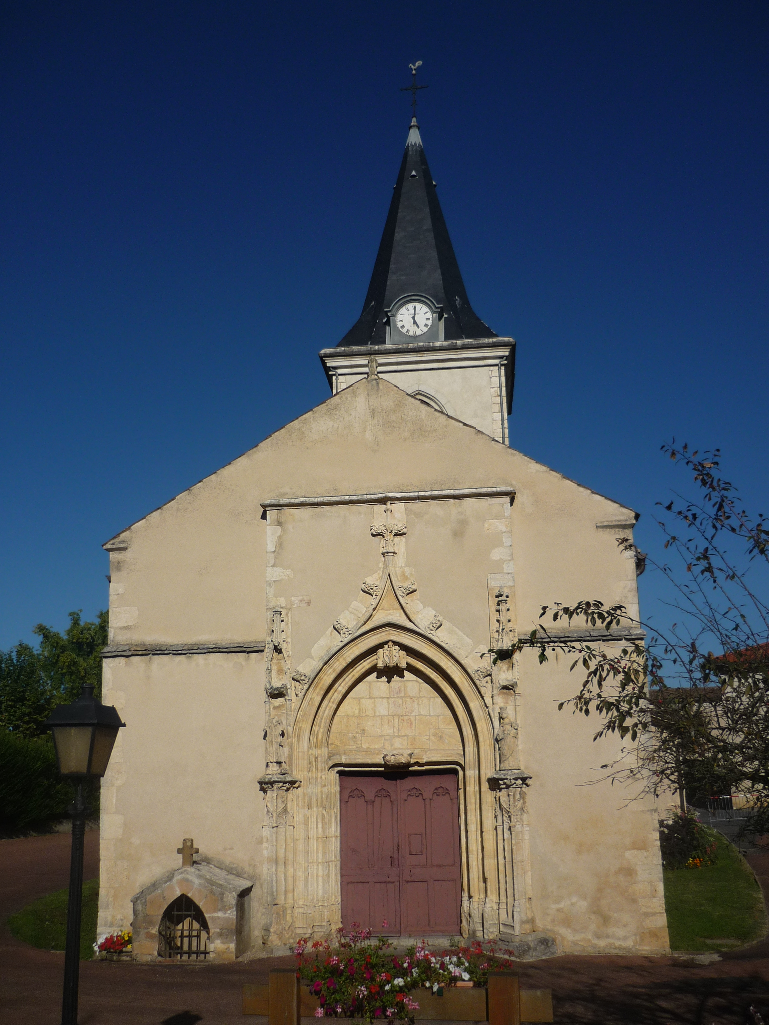 Église Saint-Étienne de Frans